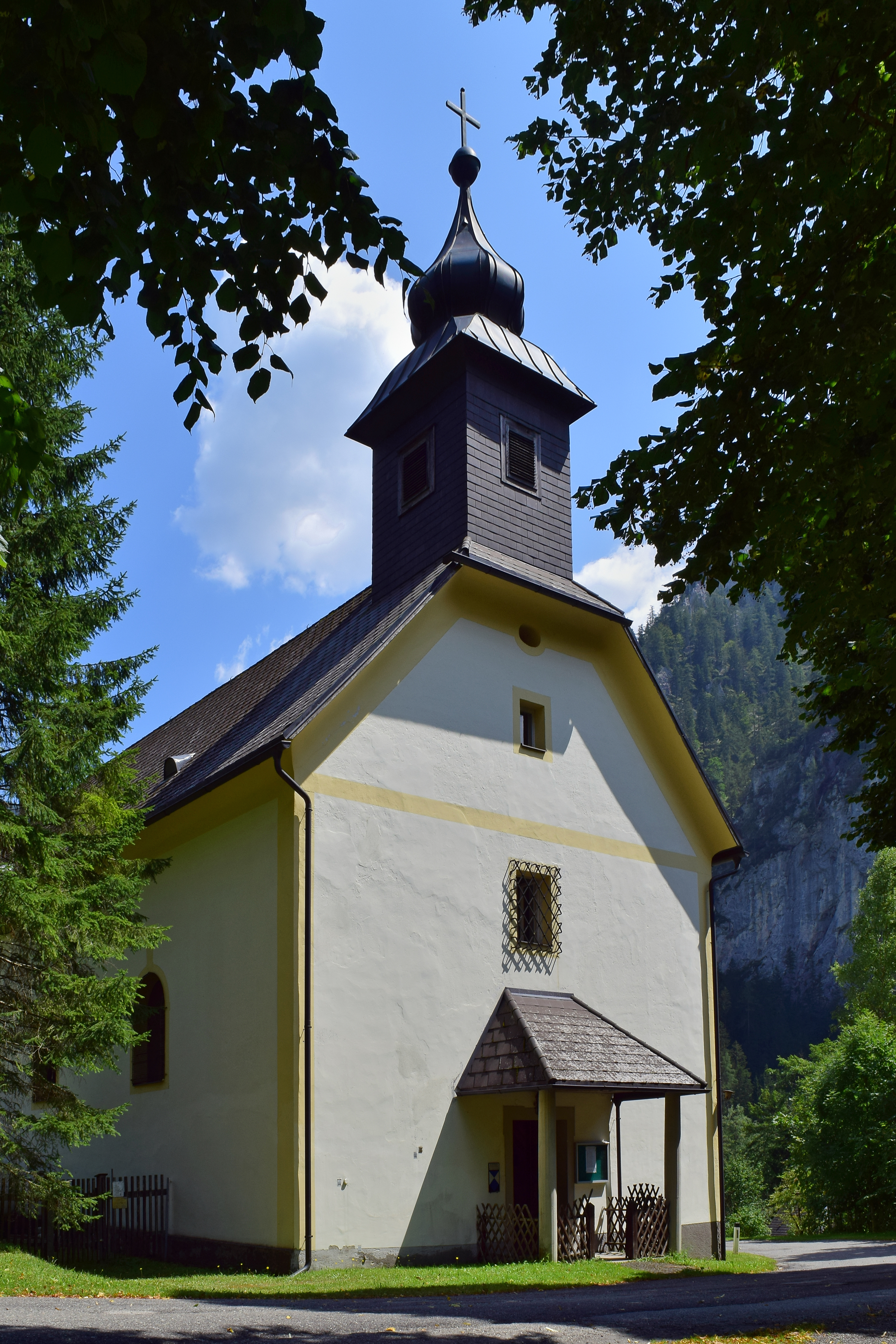 Kath. Filialkirche hl. Johannes in der Wüste